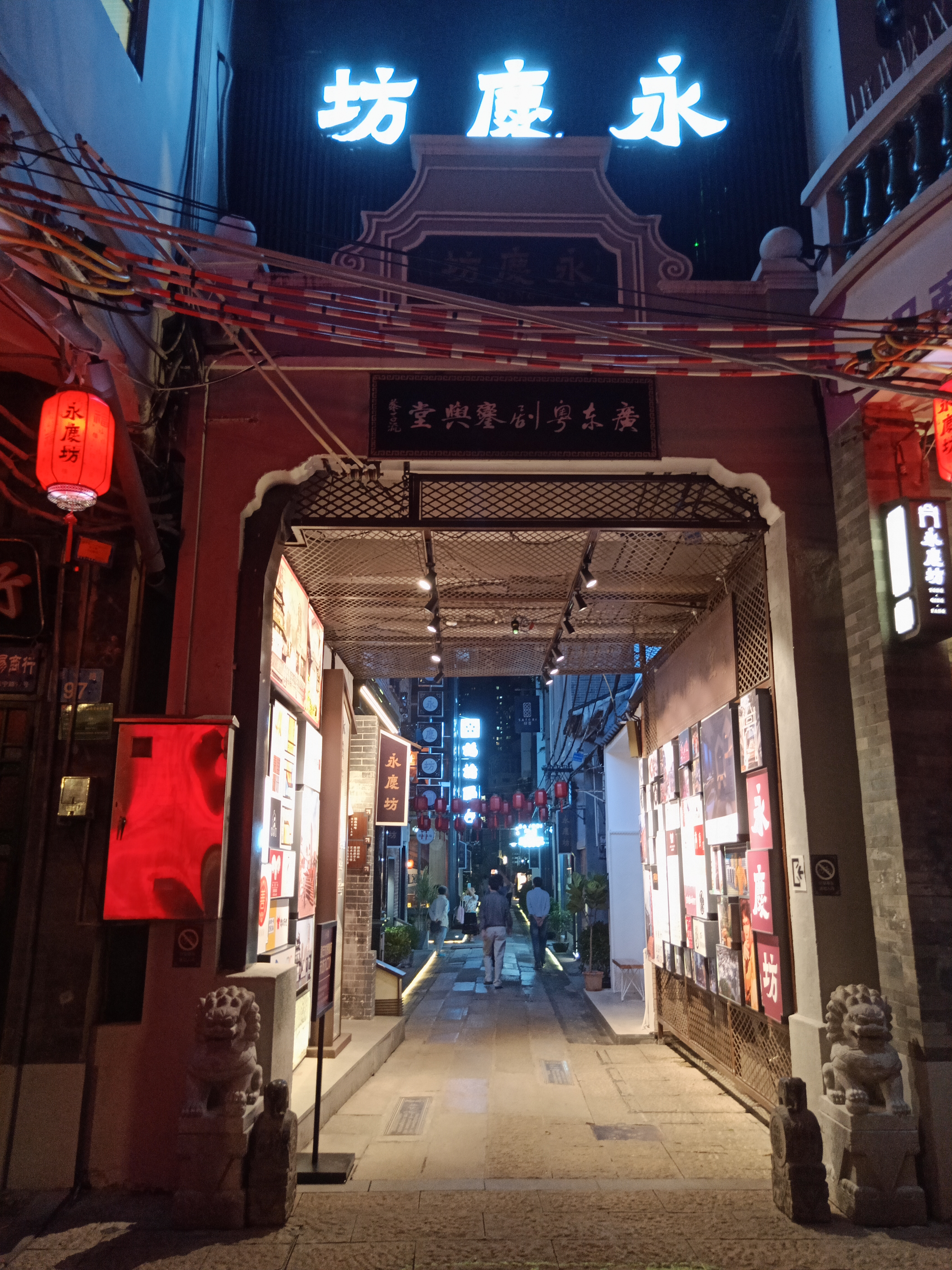 粵語: 喺中國廣東廣州荔灣區恩洲社區恩寧路嘅永慶坊嗰邊